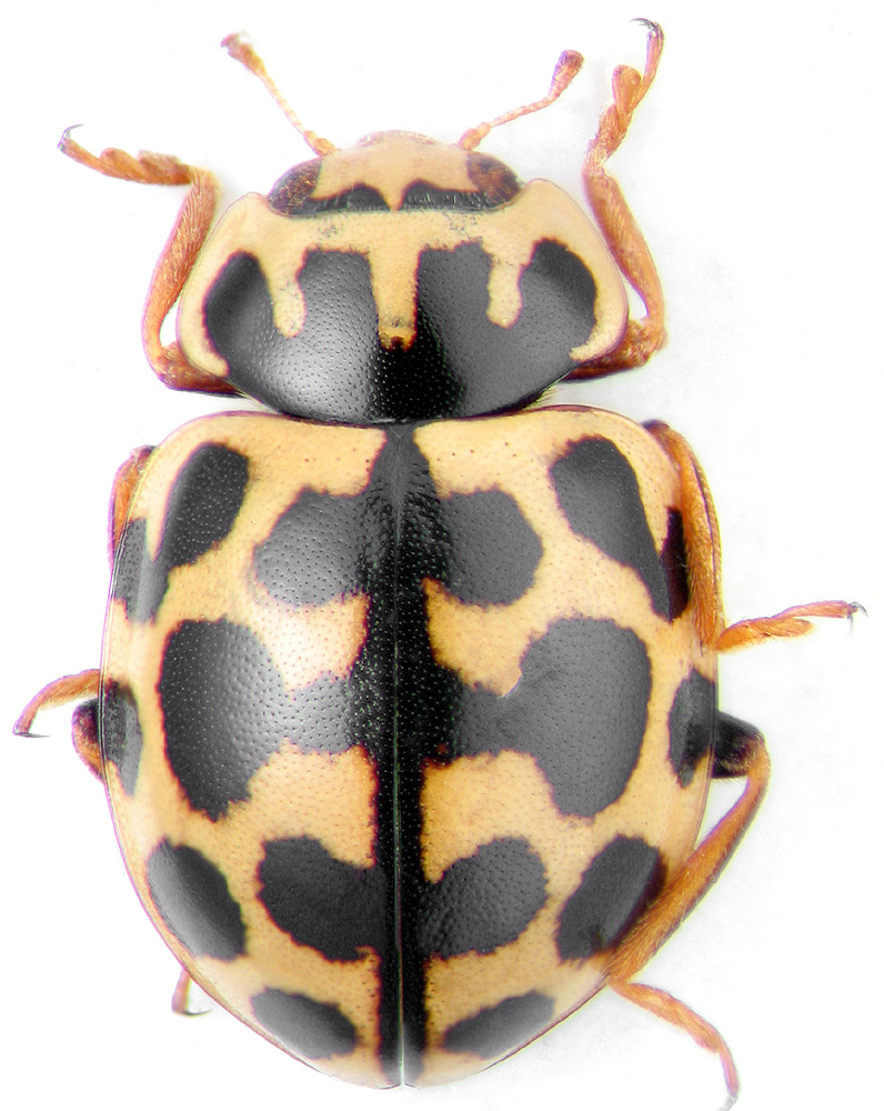 Coccinula redimita